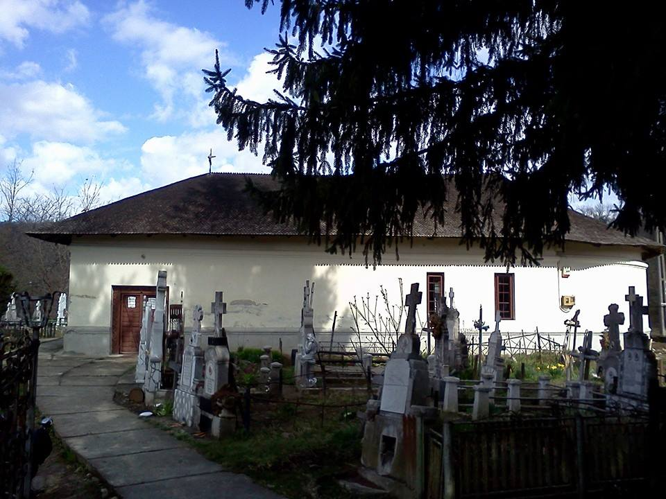 Biserica „Cuvioasa Paraschiva”